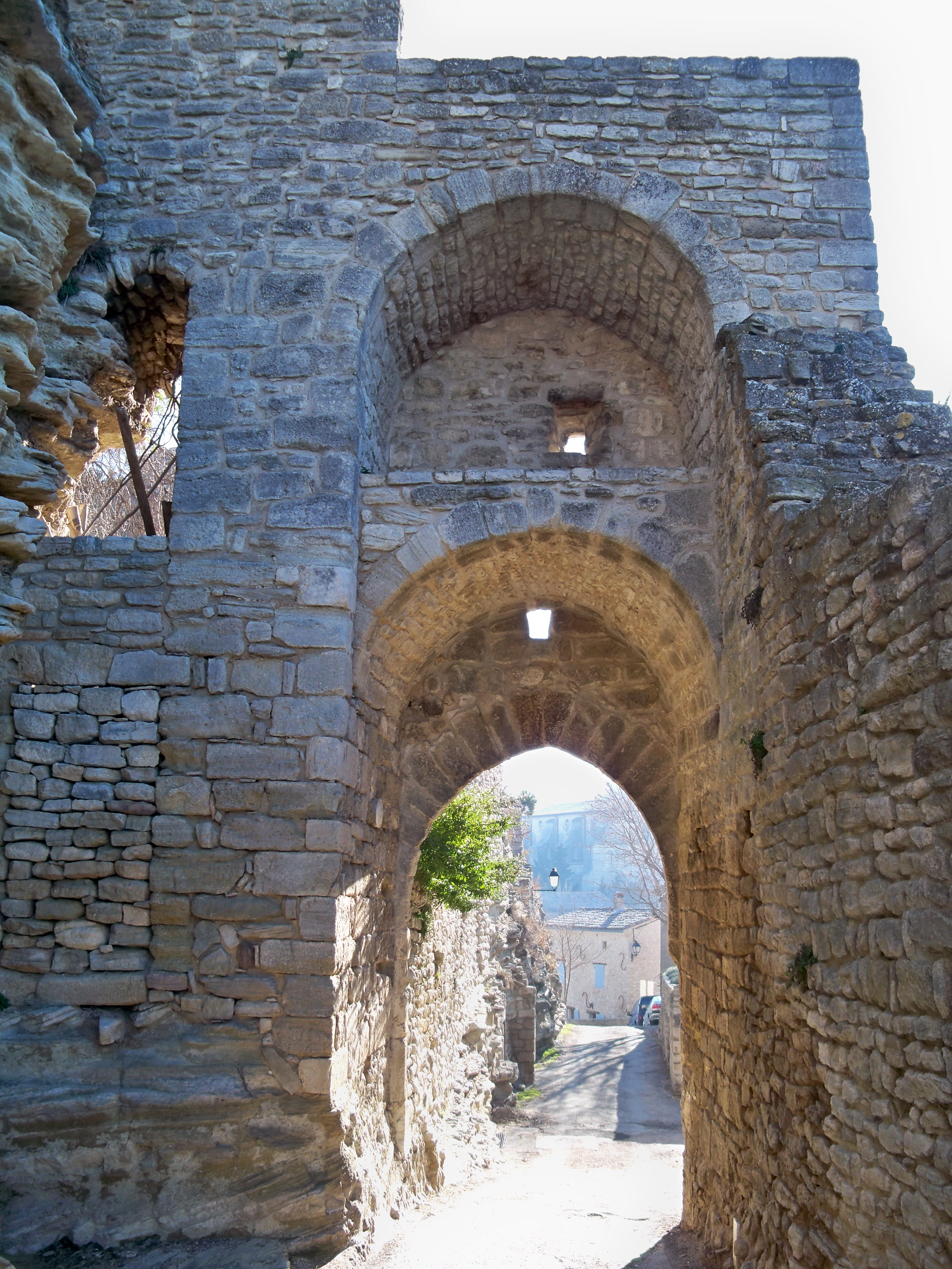 porte des anciens remparts de Saignon, Vaucluse, France